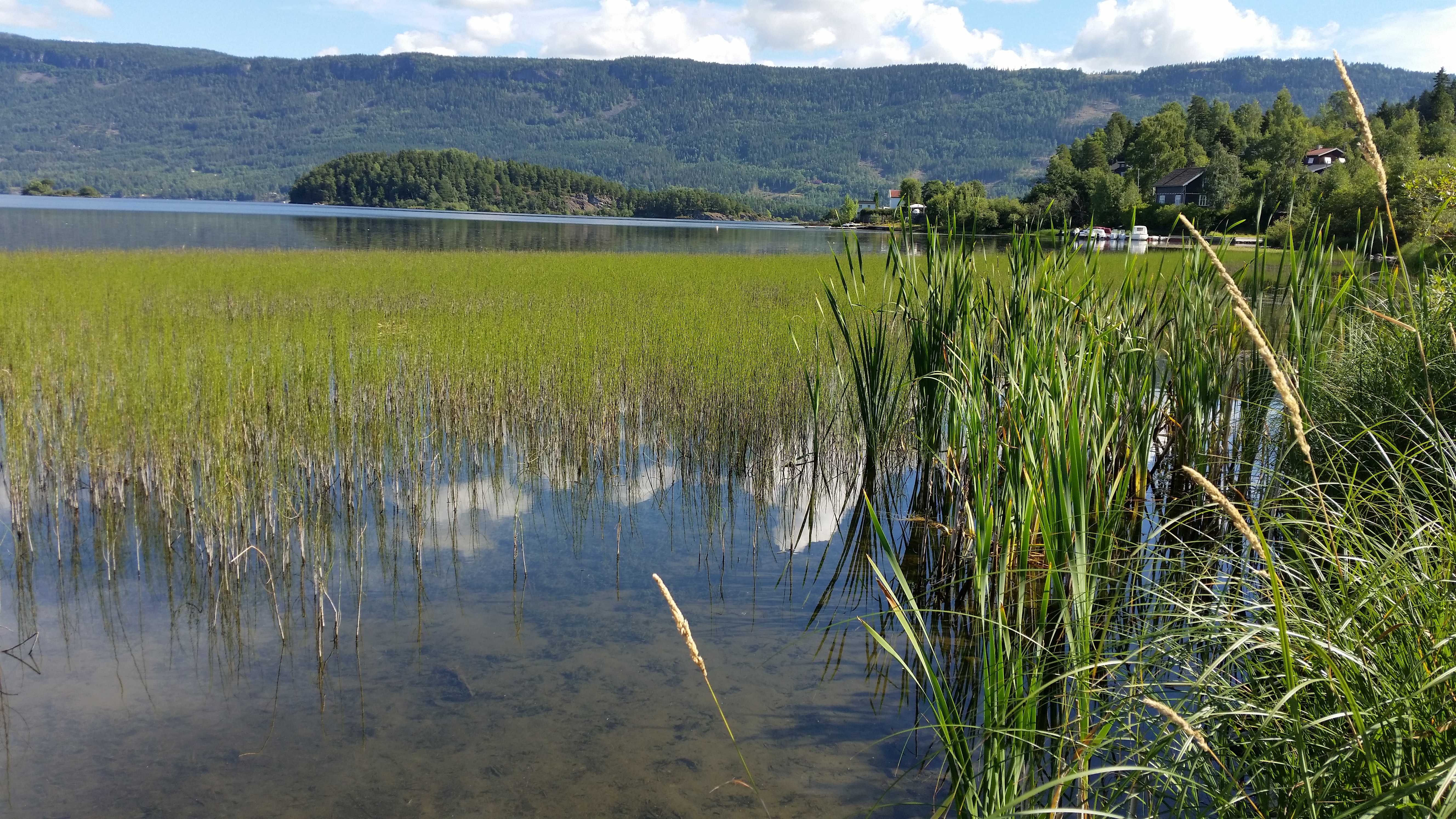 Steinsfjorden biotopverneområde ved Vik i Hole, sett mot Garntangen